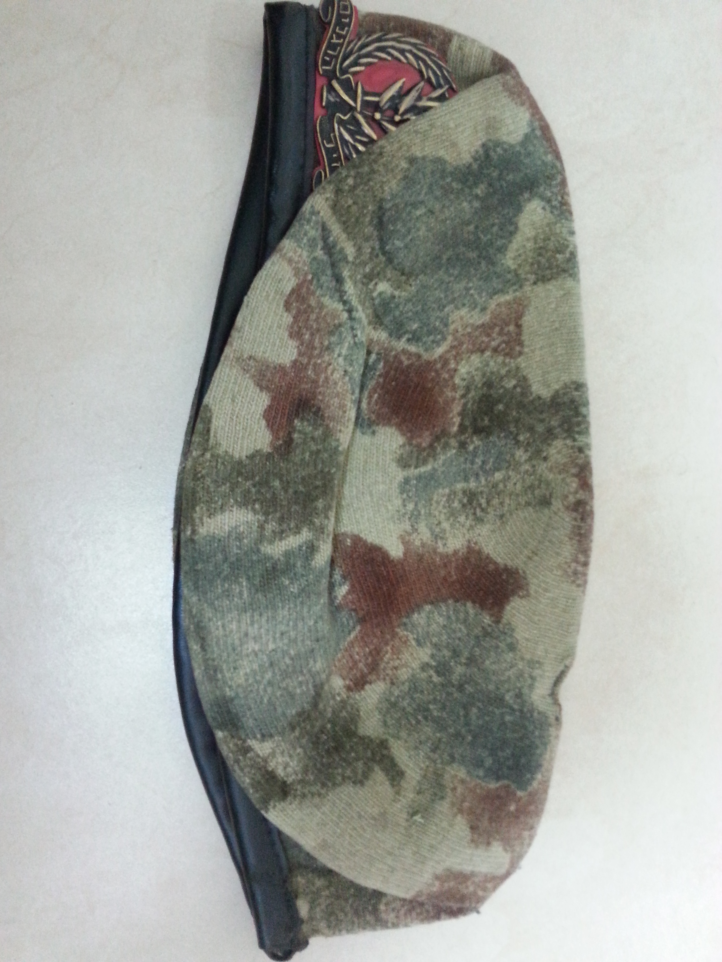 כומתת חטיבת כפיר